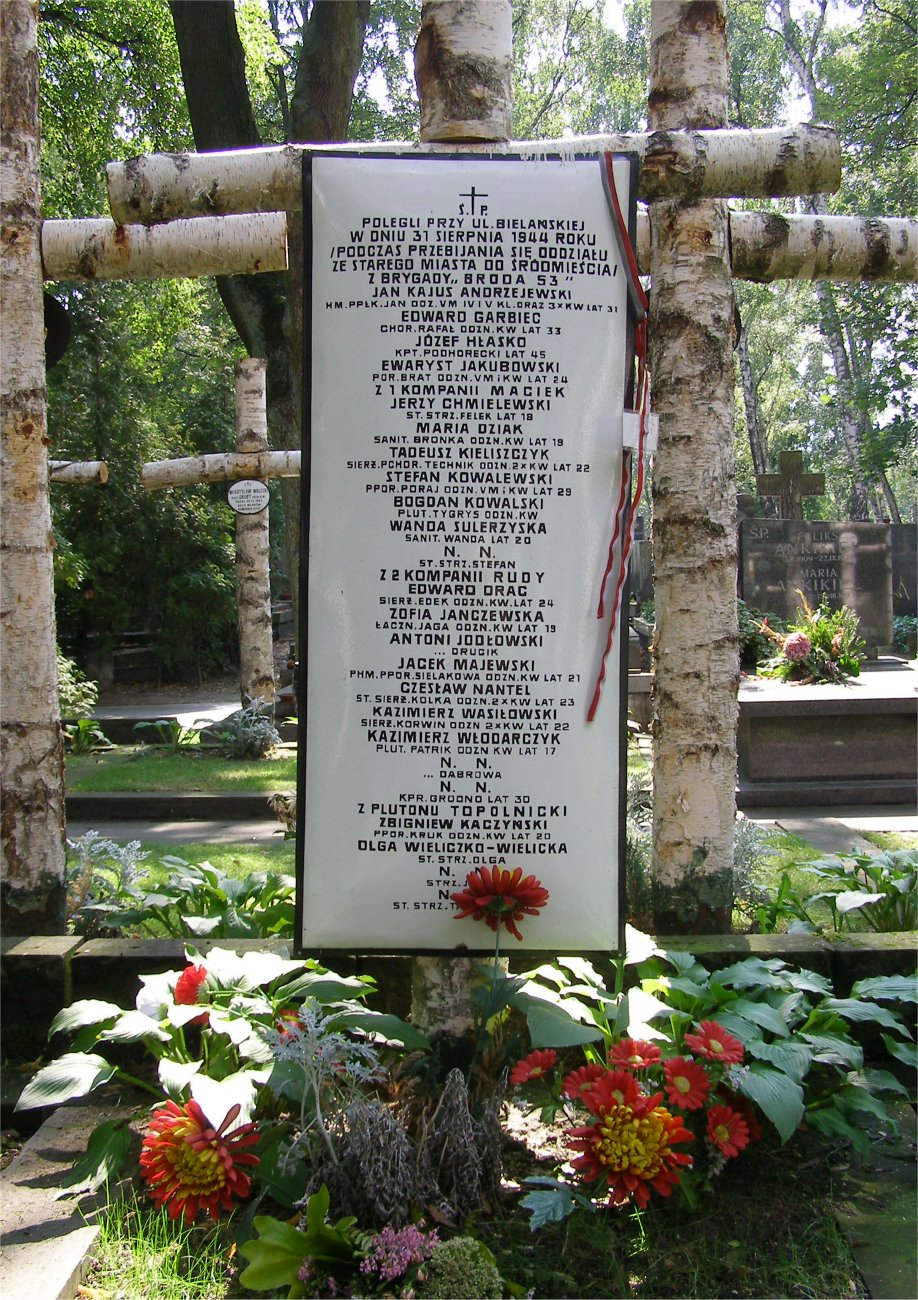 Na Powązkach Wojskowych w Warszawie (fot Zu)